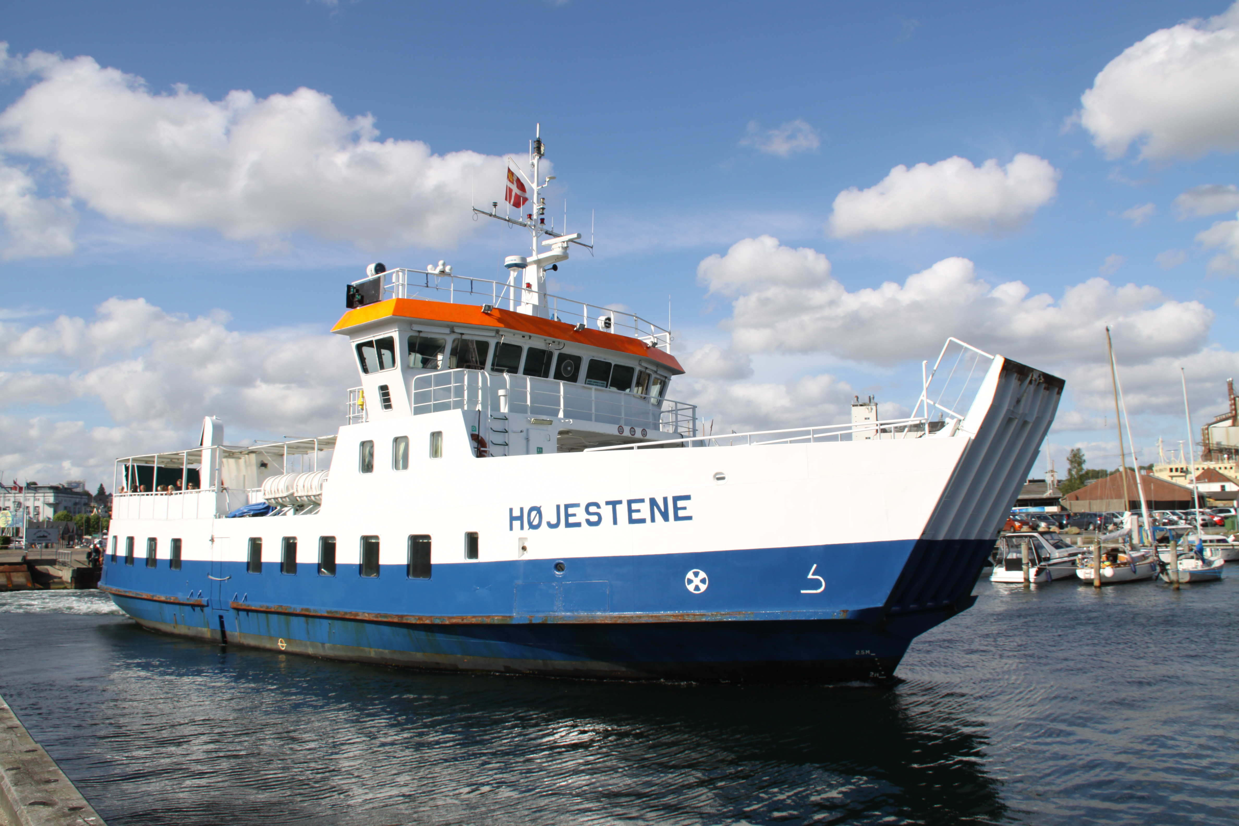 Højestene in Svendborg